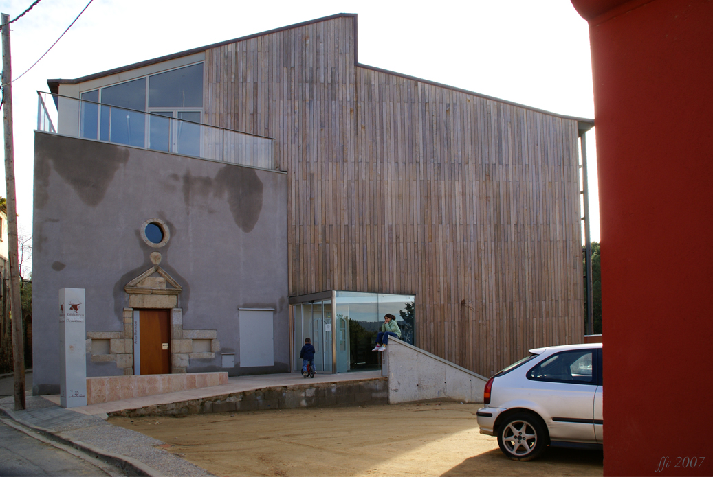 Façana principa de la biblioteca municipal Pere Caner a Calonge